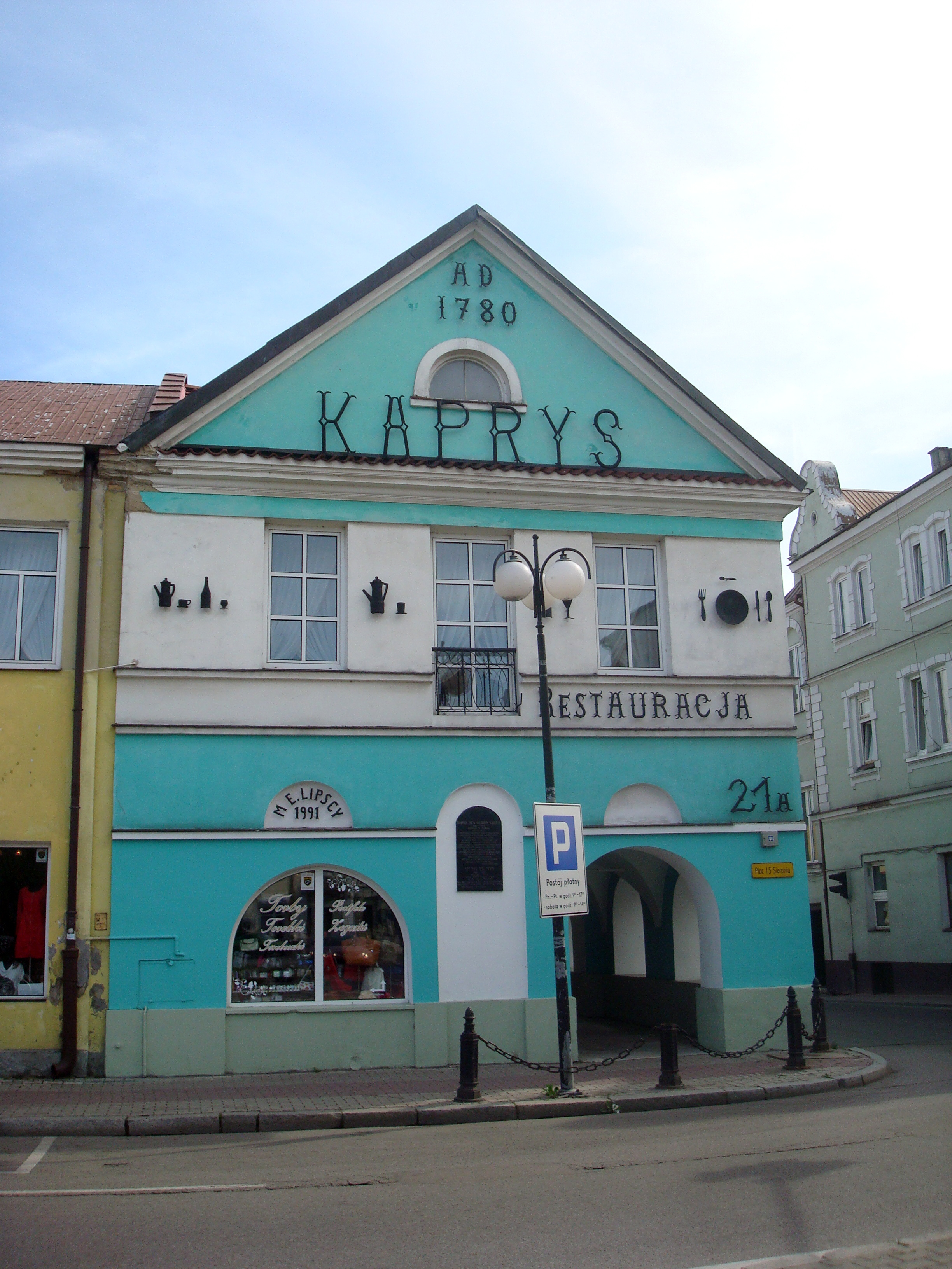 dom, XVIII w. Płońsk pl. 15 Sierpnia 21-21A, Płońsk